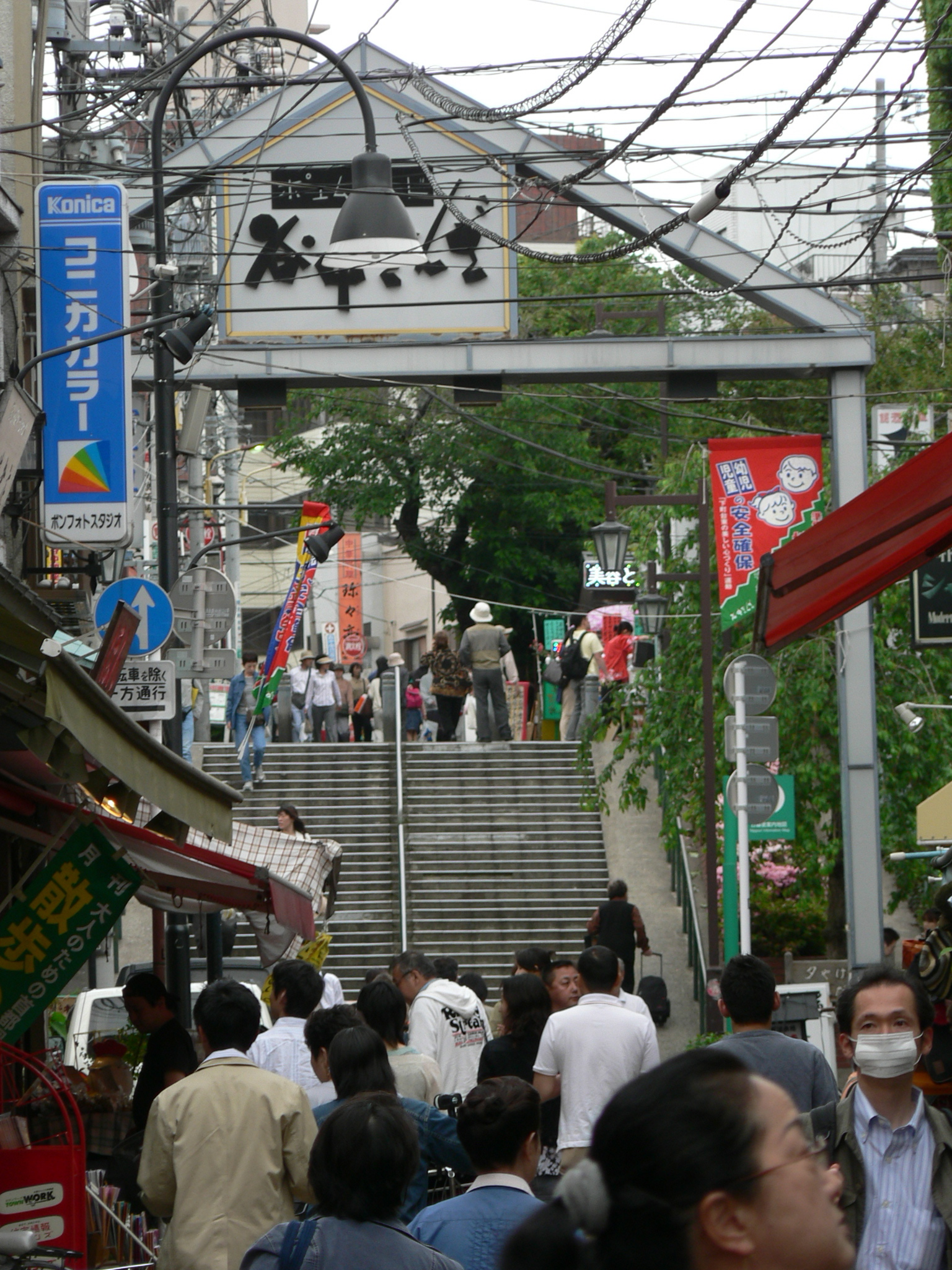 谷中銀座商店街（東京・台東区谷中3-15-1、谷中ぎんざ商店街[1]の写真屋屋「ボンフォトスタジオ」付近）